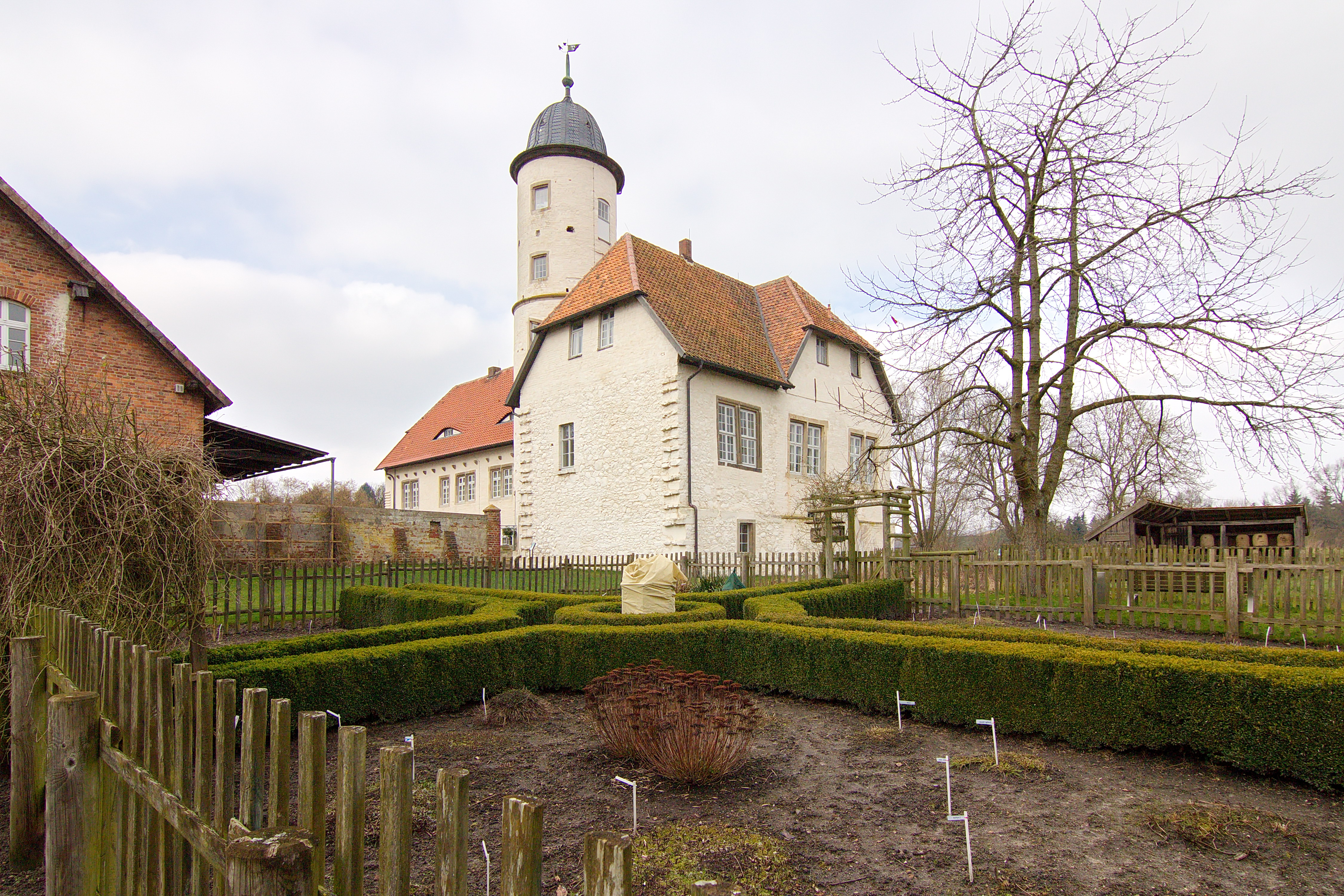 Burg Brome in Brome, Niedersachsen, Deutschland